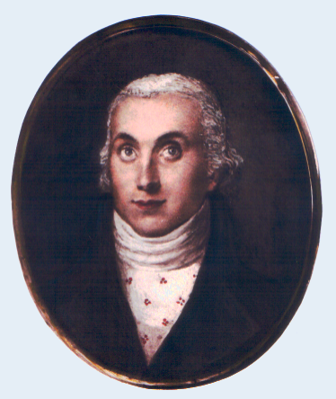 Porträt des Baumeisters Paul Ludwig Simon